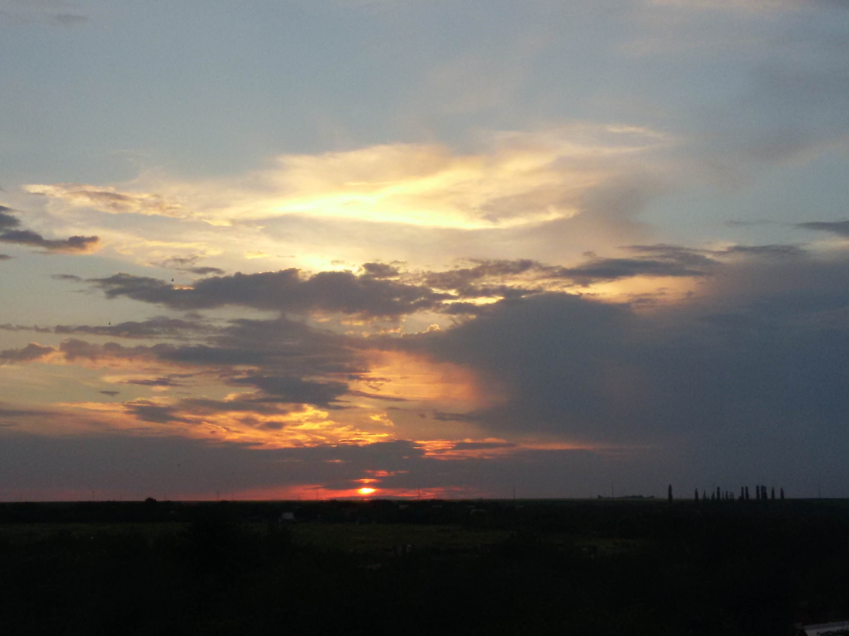 Закат. Июнь. город Губкин